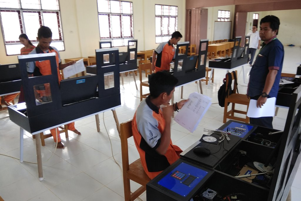 Kegiatan praktek Peserta Didik di Lab Komputer dipandu seorang Guru